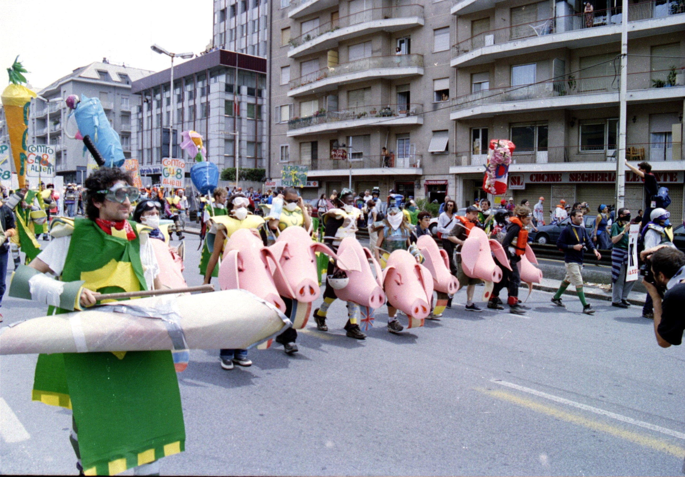 Genova - Fatti del G8 del 20 luglio 2001 Corteo disobbedienti in Corso Europa (pressi sede RAI, secondo palazzo da destra)